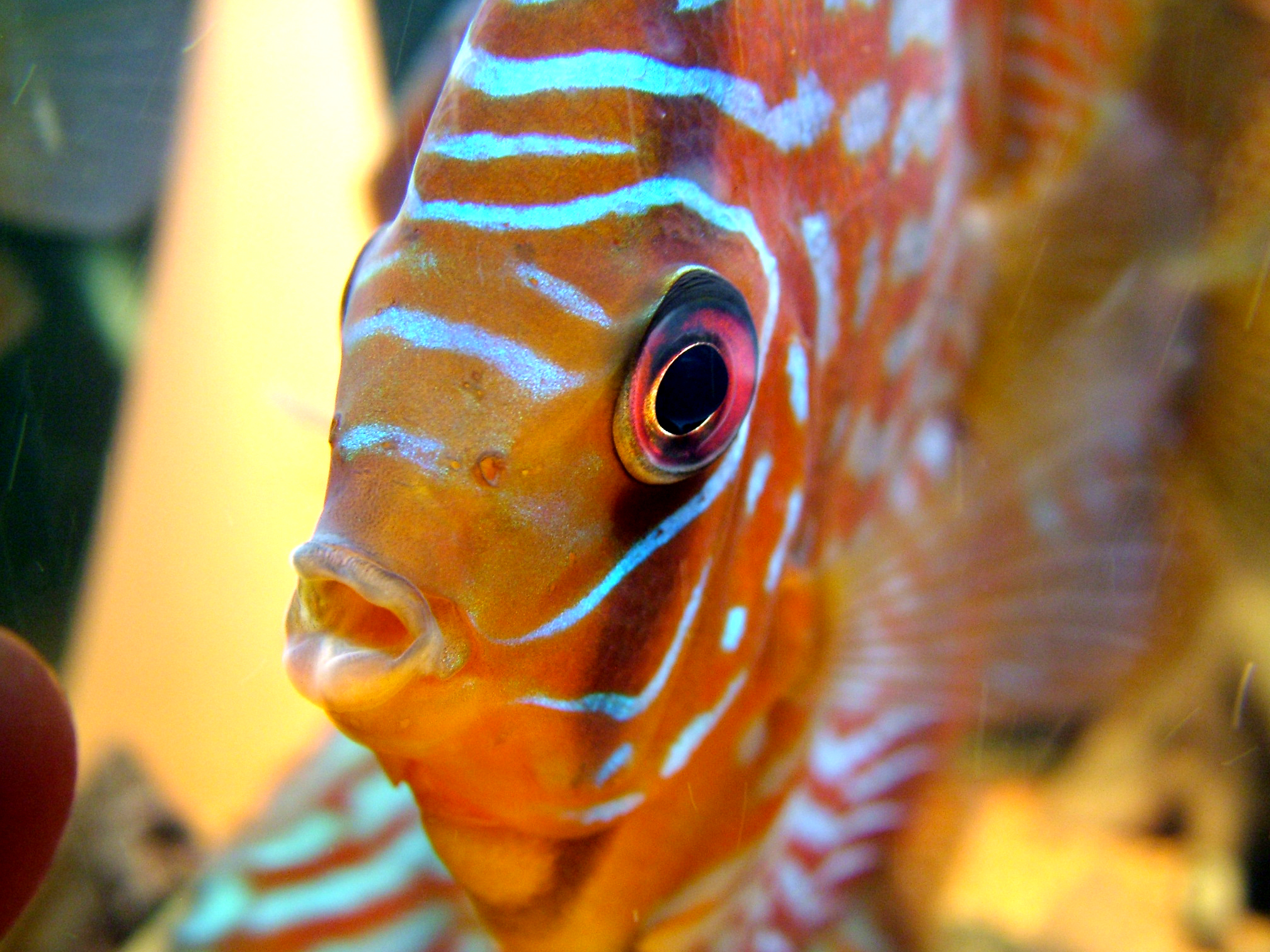 Ein Diskusfisch